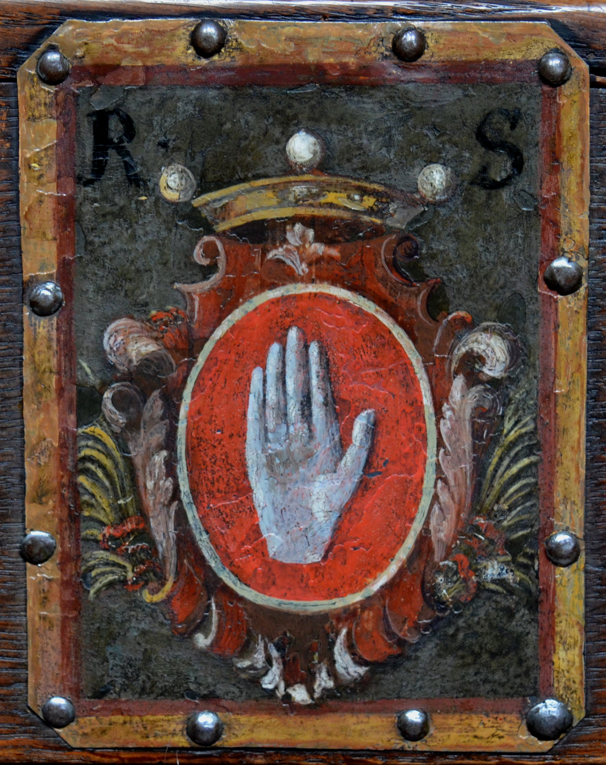 Bern, Münster, Kirchenortschild R Sinner (Detail)